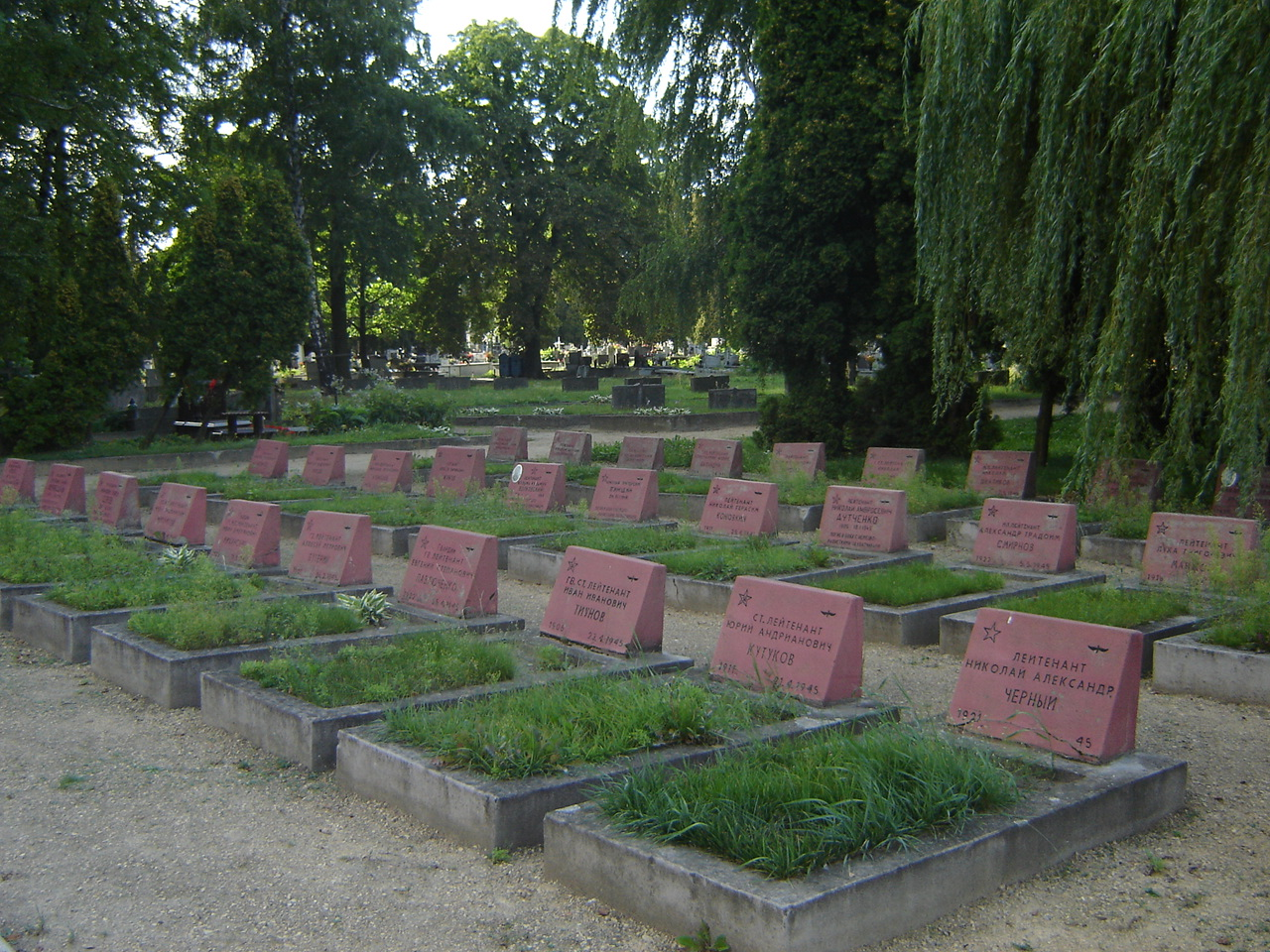 Częstochowa - Cmentarz kule, kwatera wojenna żołnierzy Armii Czerwonej